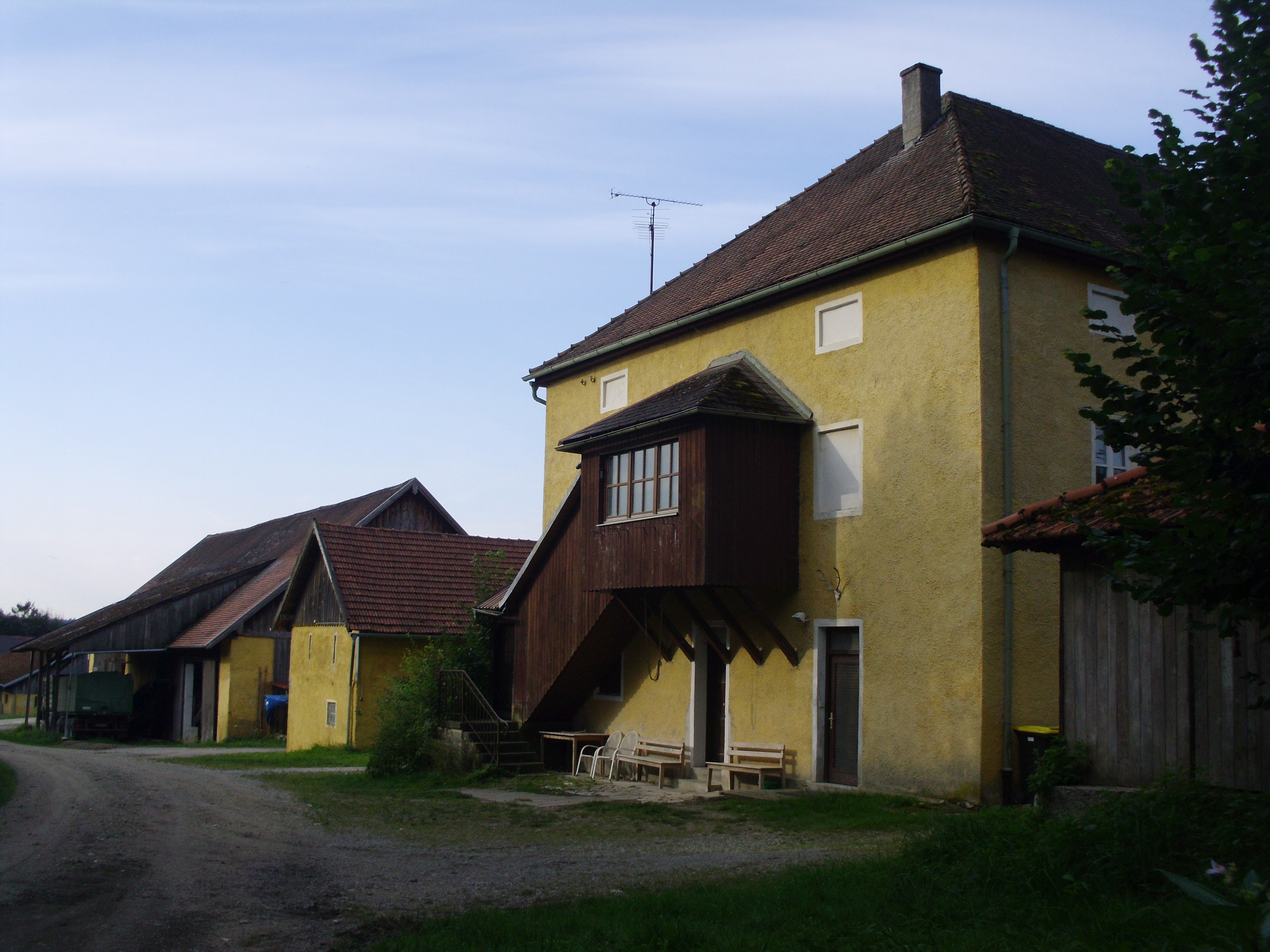 Hofgut Dittenfeld, Ortsteil von Rennertshofen im Landkreis Neuburg-Schrobenhausen, Nördliches Gebäude